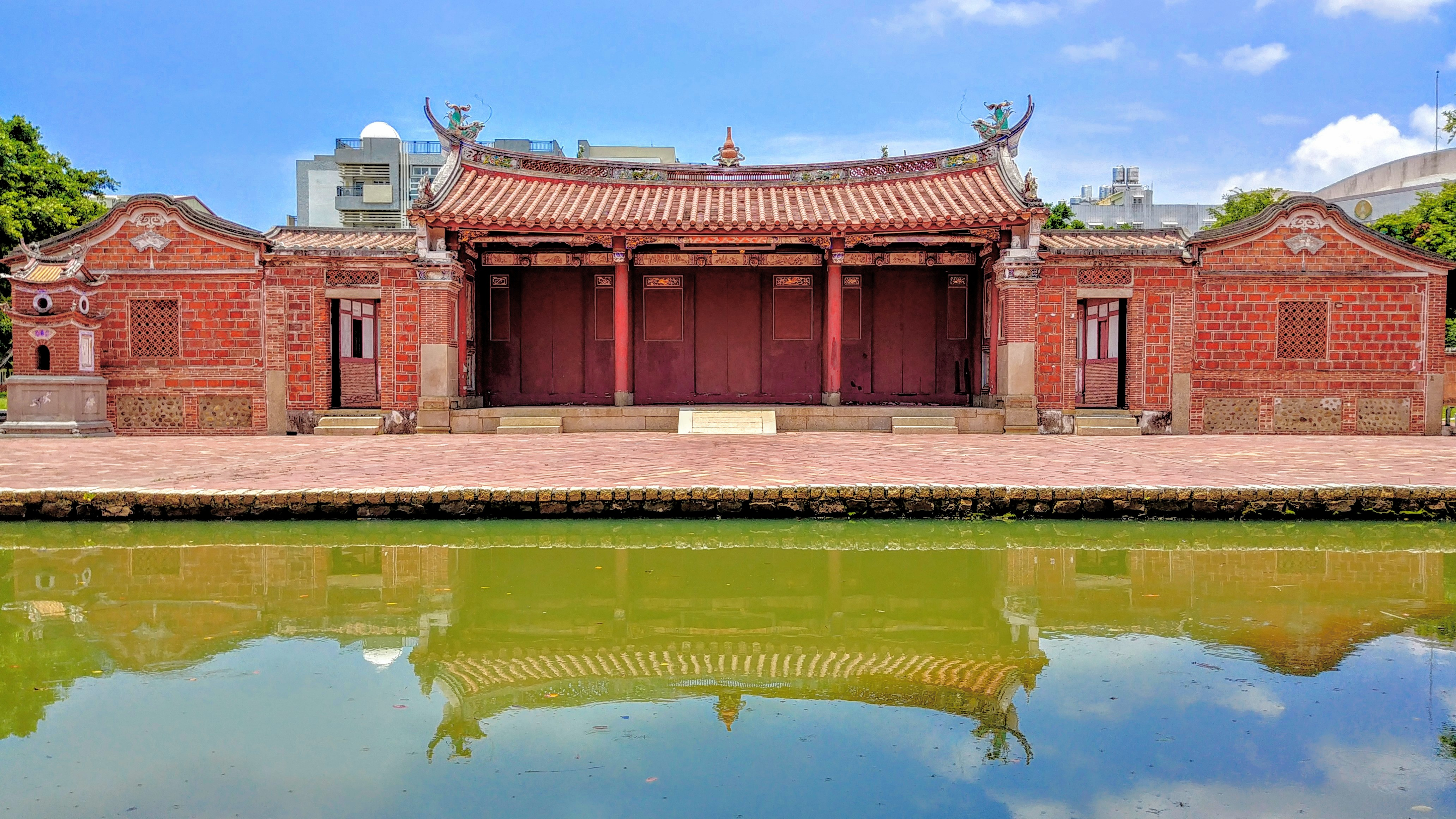 彰化和美道東書院